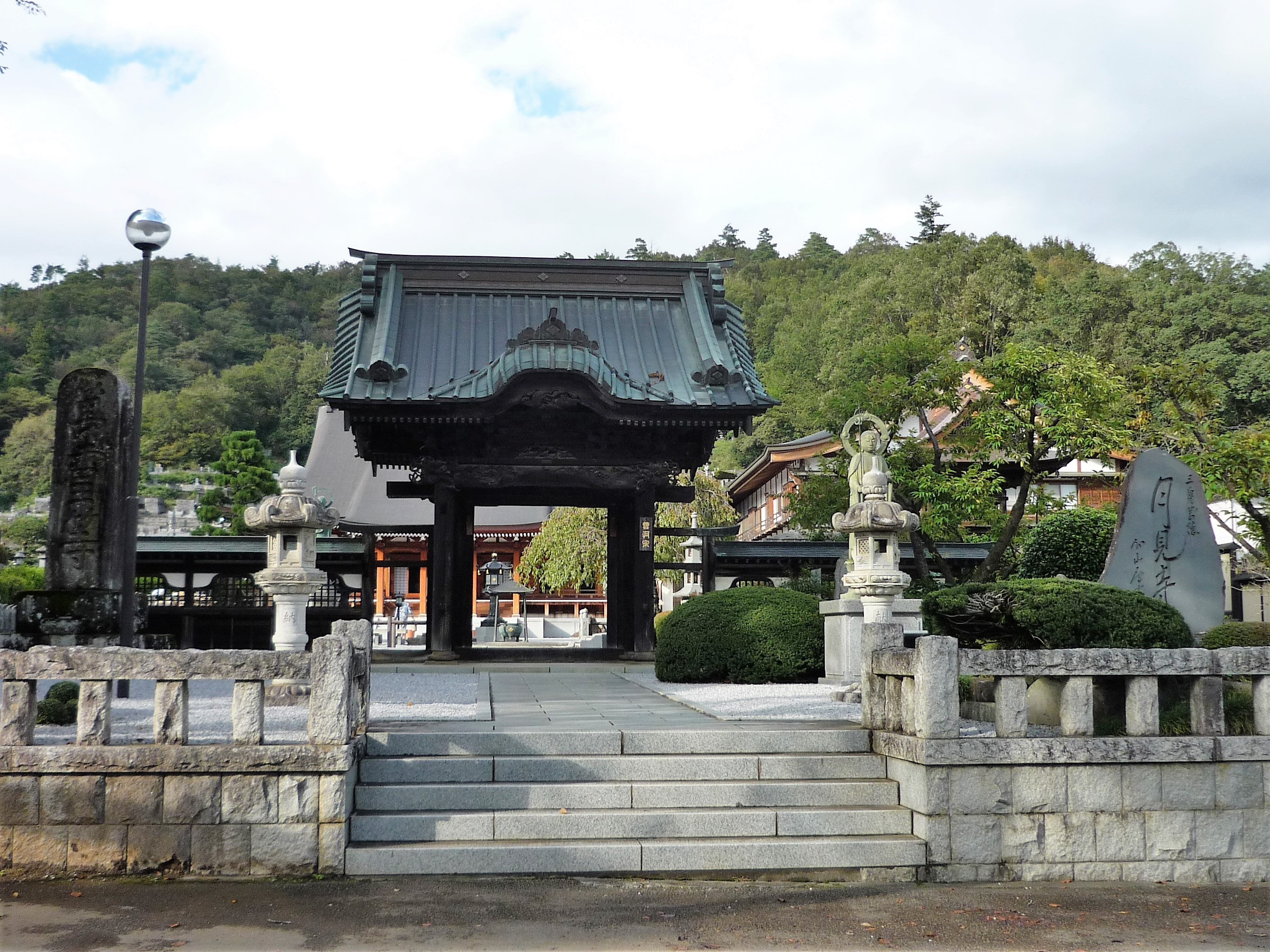 安寧山 保福寺（上野原市上野原）